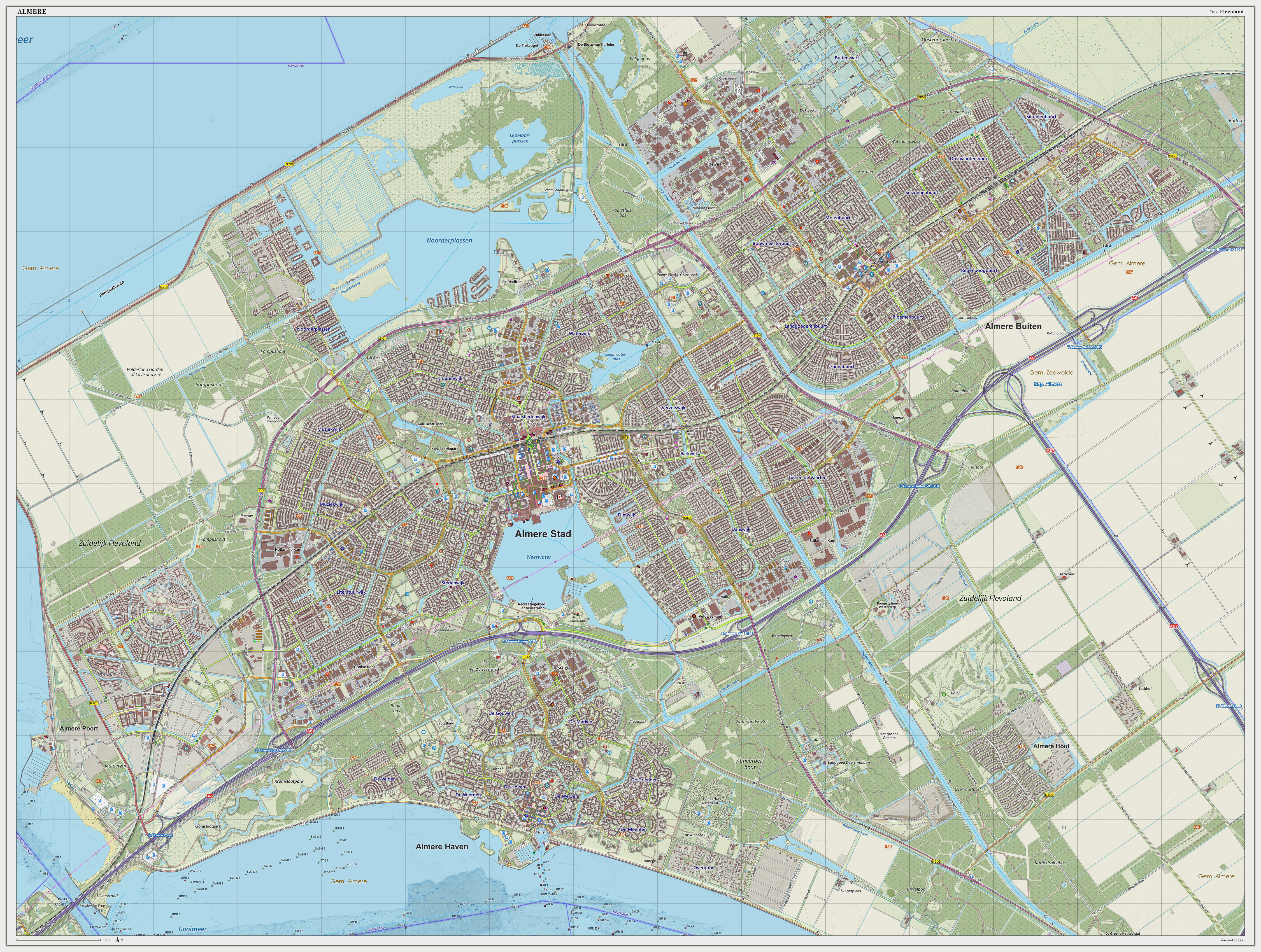 Topografische kaart van Almere (woonplaats). Resolutie: 300 pixels/km. Kaartbeeld samengesteld uit de open geodata van de Top10NL en Top25namen (Basisregistratie Topografie, Kadaster), Creative Commons BY licentie. Gebouwvlakken uit open geodata BAG extract. Wegen uit de OpenStreetMap, OpenStreetMap community. Reliëfschaduw uit de Actuele Hoogtekaart AHN2. Samenstelling en kleurenschema: Jan-Willem van Aalst, met QGIS2. Zie ook de Legenda.